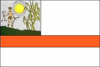 Araioses